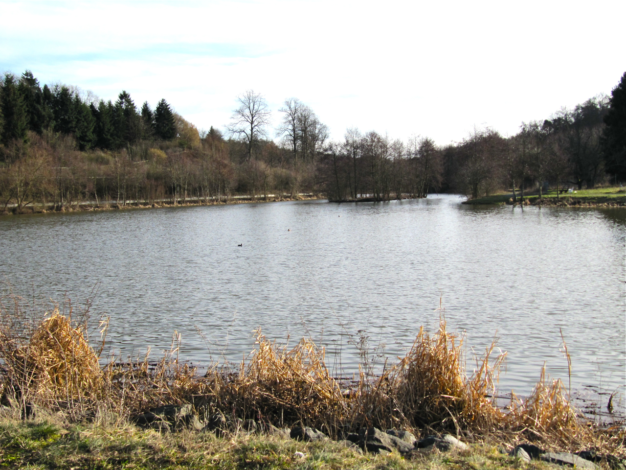 Ansicht des Modau Rückhaltebeckens bei Ober-Ramstadt.